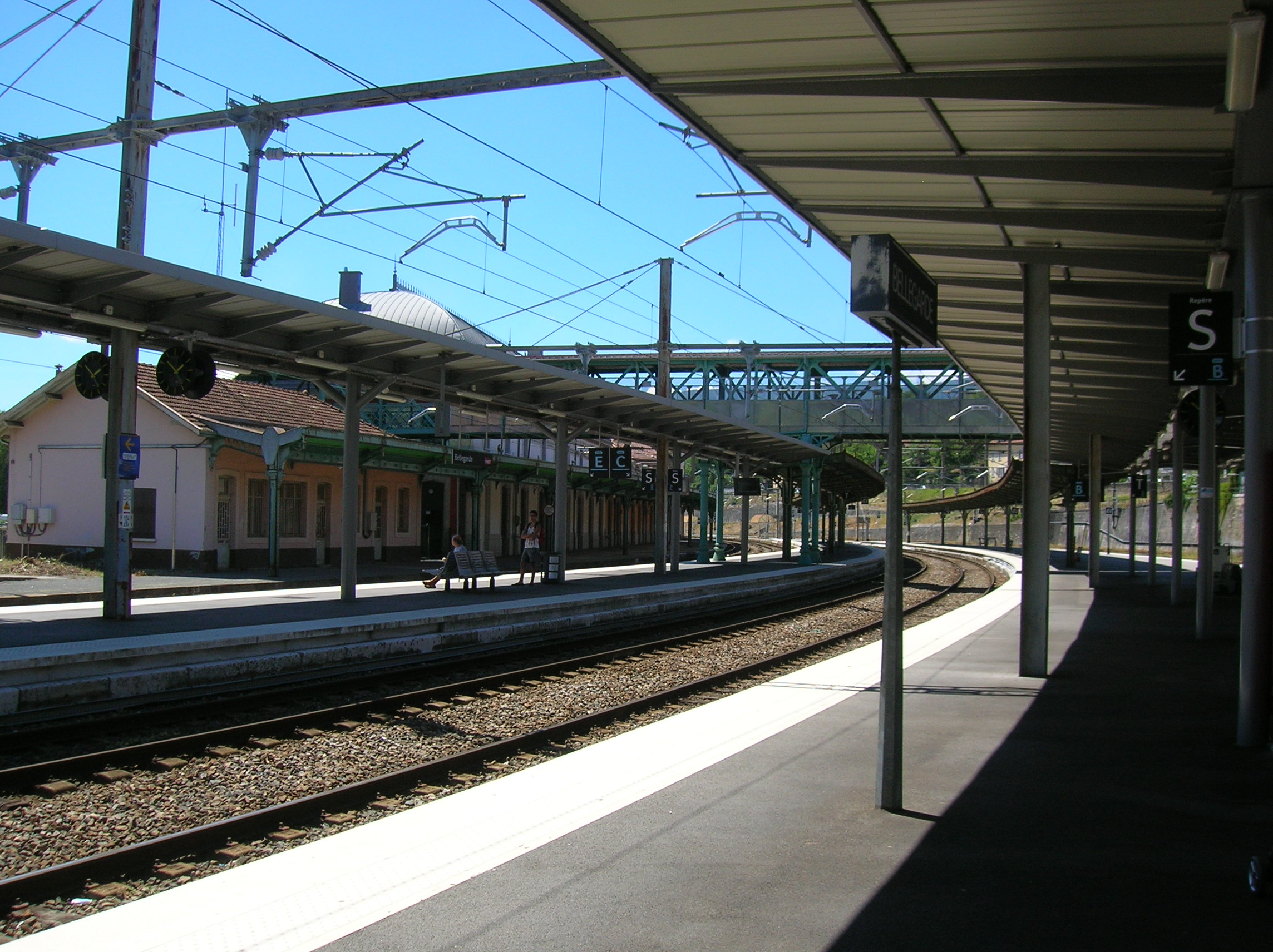 Gare de Bellegarde-sur-Valserine